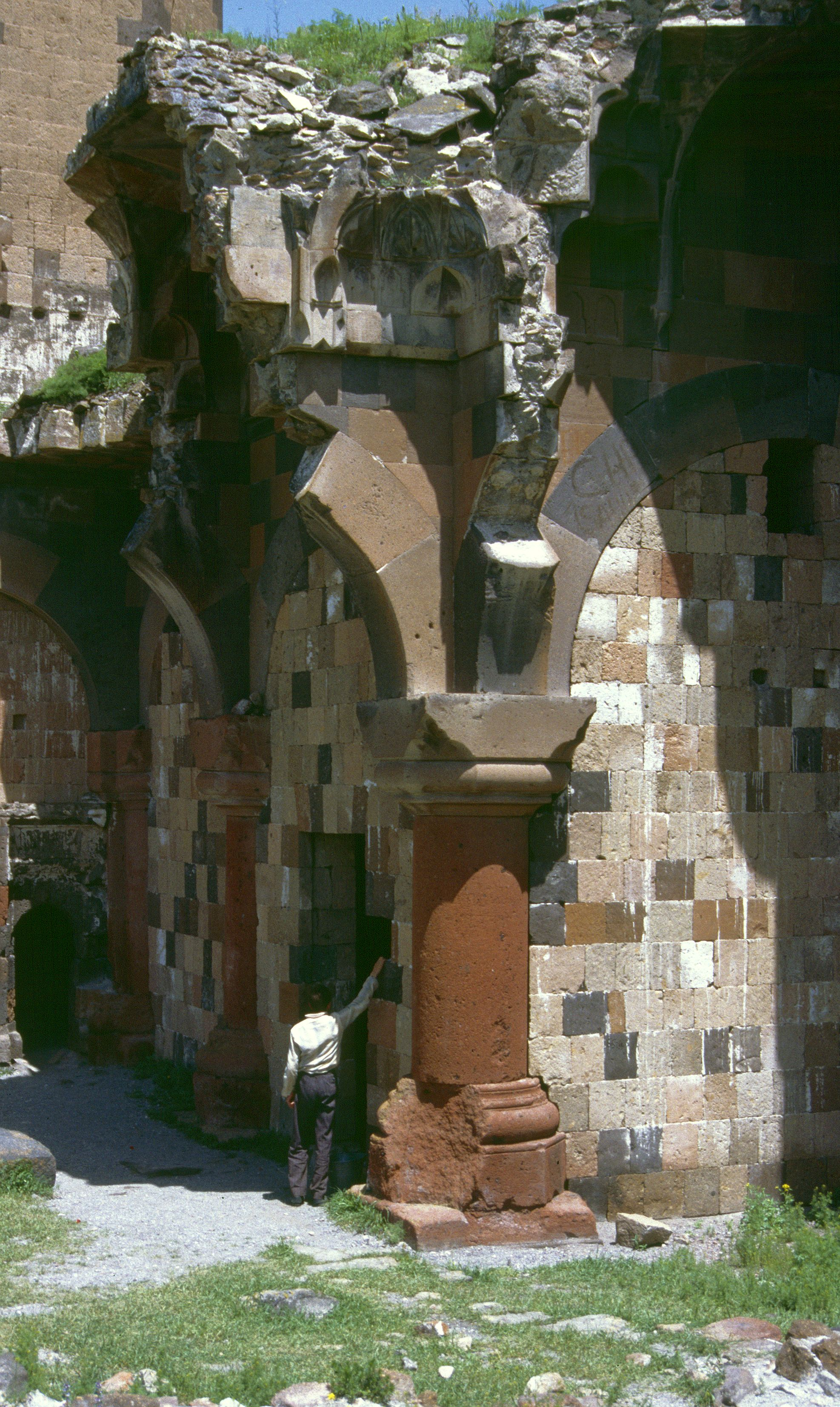 Ani: Moschee des Menücahr